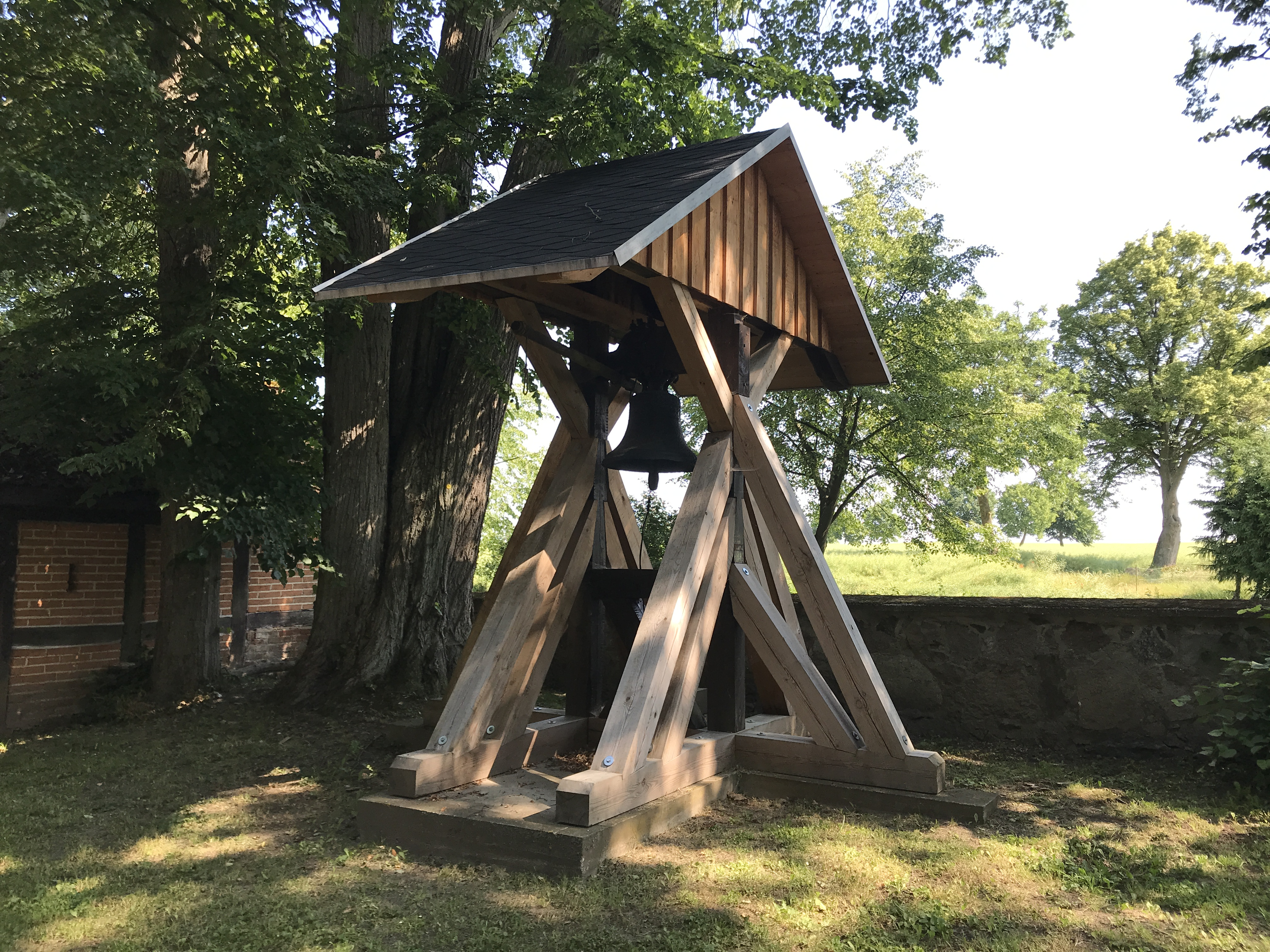 Die Dorfkirche Güterberg ist eine Saalkirche in Güterberg, einem Ortsteil der Gemeinde Uckerland im Landkreis Uckermark in Brandenburg. Die Kirchenausstattung ist bauzeitlich.